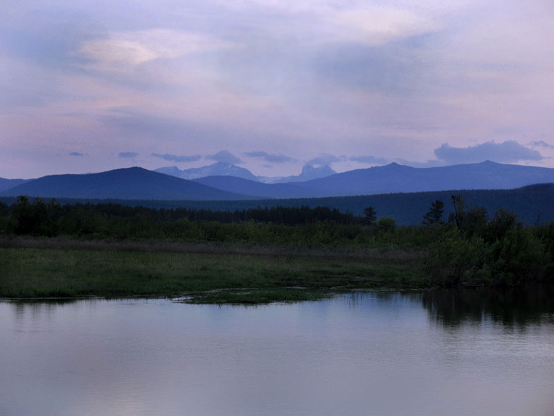 Южно-Муйский хребет